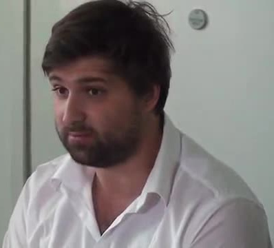 Rado Pezdir